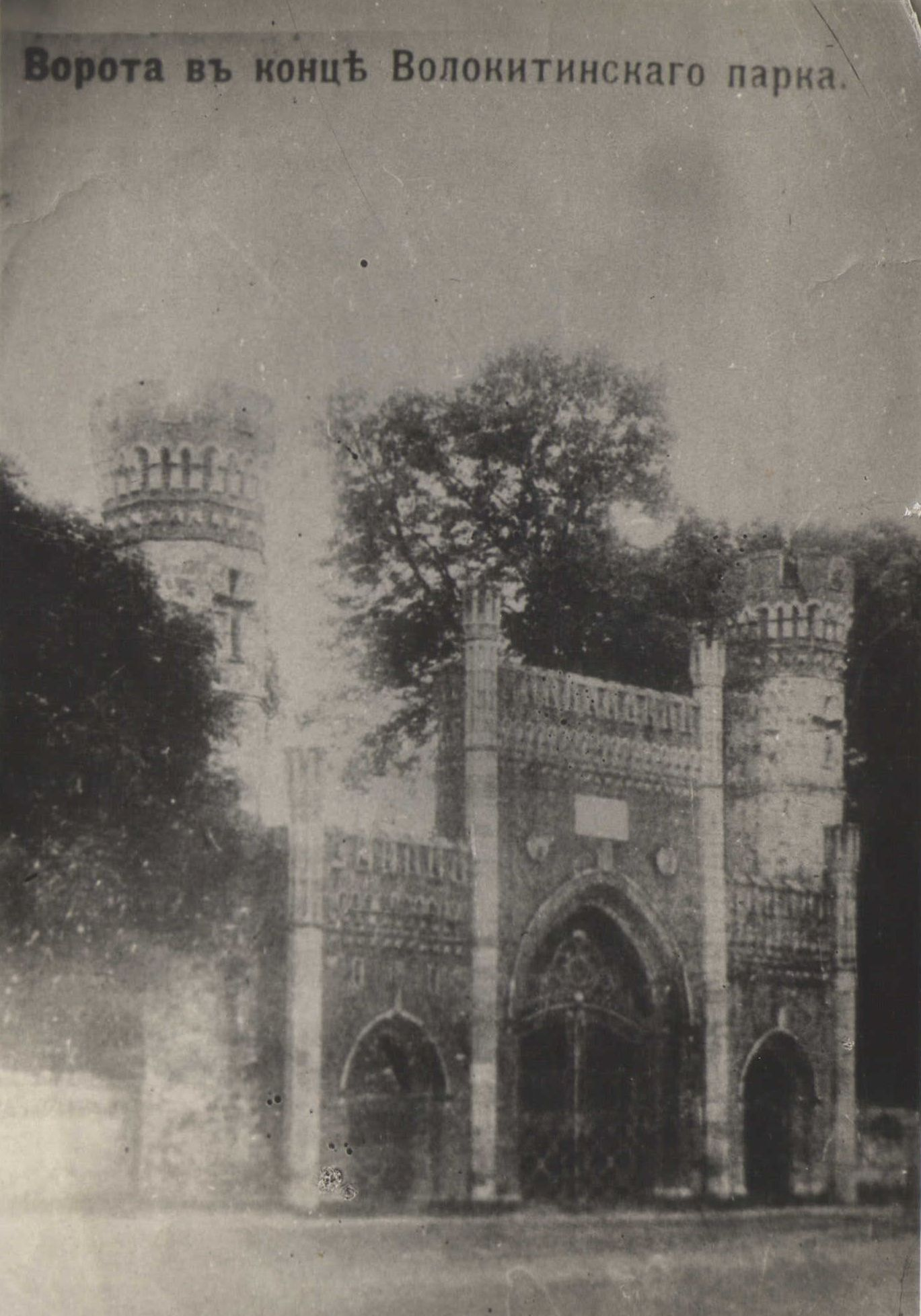 Ворота "Золоті Ворота" в селі Волокитине Путивльського району Сумської області Україна